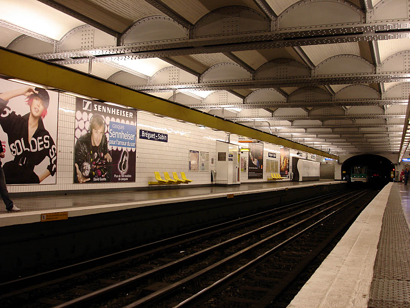 La station Bréguet - Sabin de la ligne 5 du métro de Paris, France